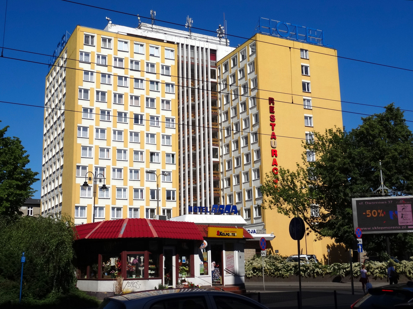 Hotel Brda w Bydgoszczy, ul. Dworcowa 94